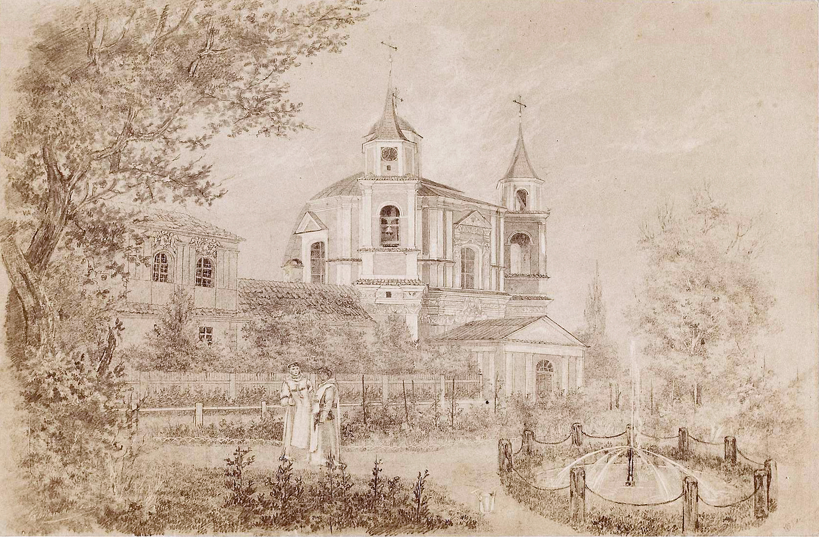 Беларуская (тарашкевіца): Вільня (Vilnia), Антокаль (Antokal). Касьцёл Пана Езуса і кляштар трынітарыяў